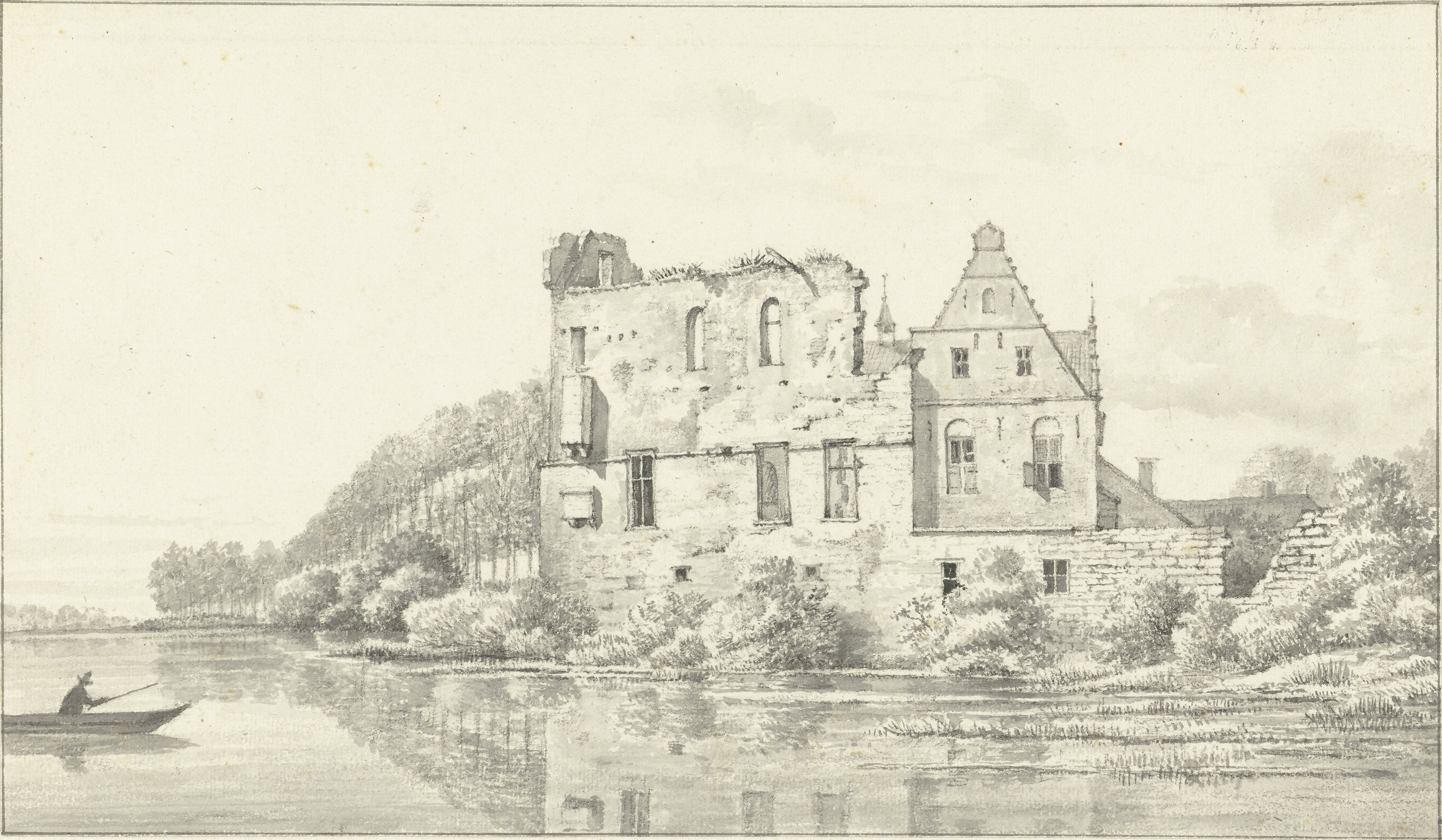 Ruine der Burg Altena in Schüttorf (Grafschaft Bentheim)